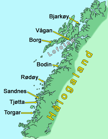 Halogaland